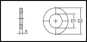 DIN 6916